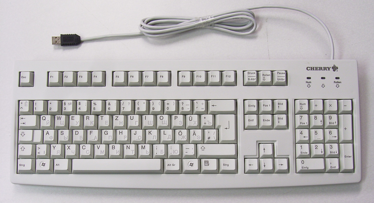 Cherry G83-6105LUNRD-0 mit deutscher und kyrillischer Beschriftung Cherry G83-6105LUNRD-0 with German and Cyrillic lettering